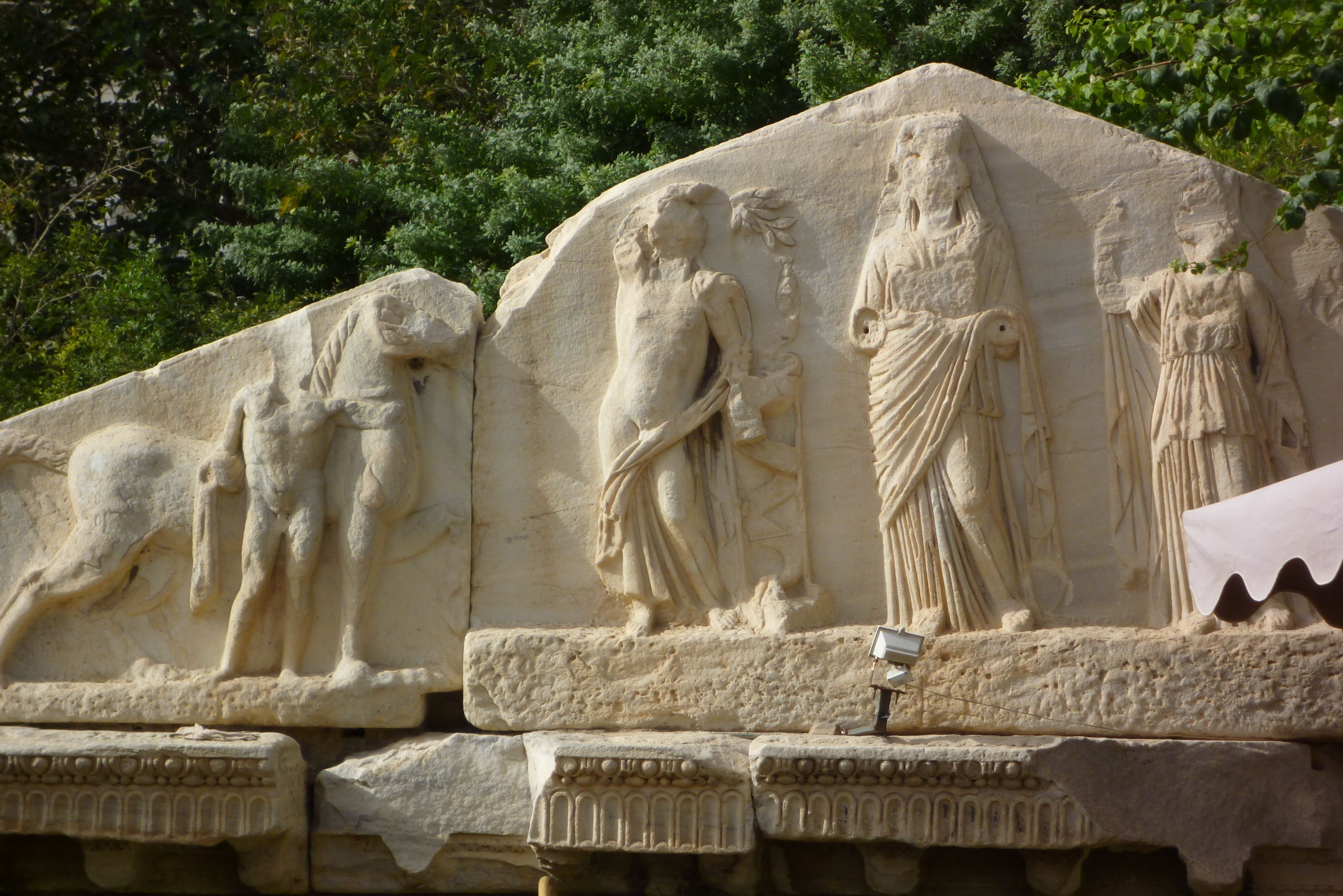 Tripoli -Fragment Tempel Genius Coloniae